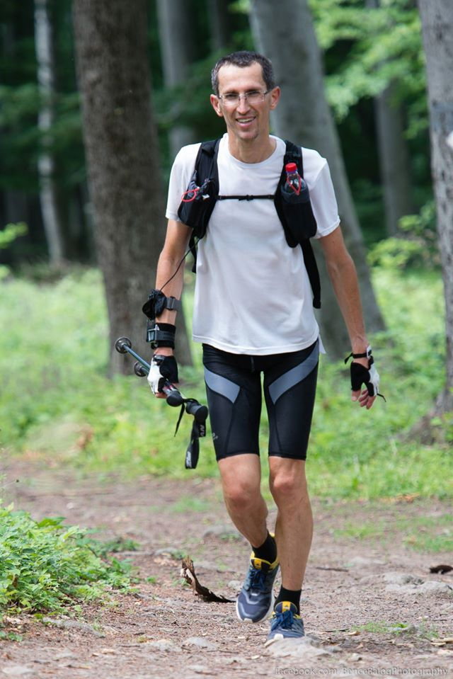 Nyakas Gábor a Kör abszolút pályacsúcs-tartója